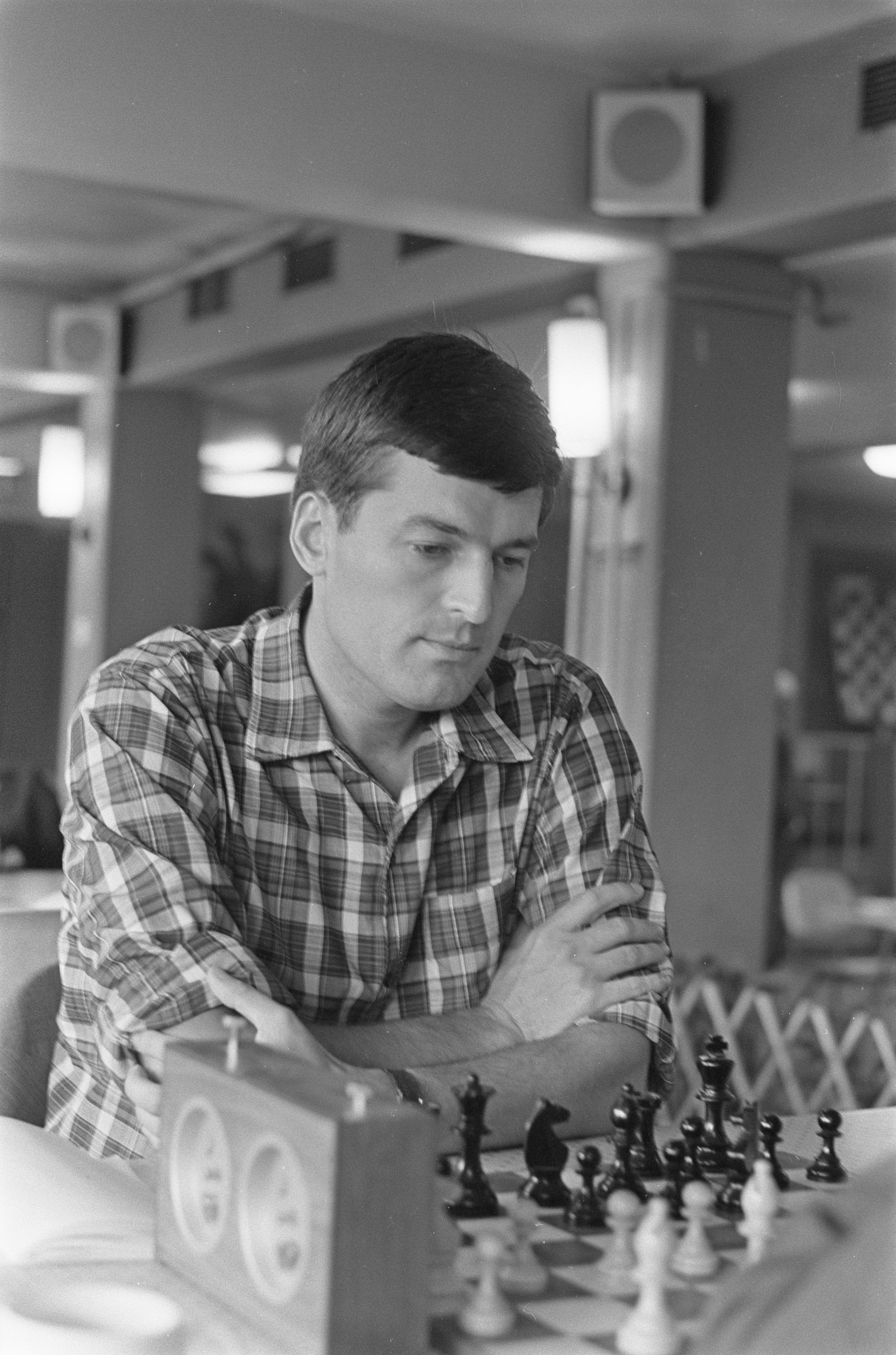 Collectie / Archief : Fotocollectie Anefo Reportage / Serie : [ onbekend ] Beschrijving : IBM Schaaktoernooi . K. Langeweg Datum : 28 juli 1967 Trefwoorden : Schaken Persoonsnaam : K. Langeweg Fotograaf : Jongerhuis, Pieter / Anefo Auteursrechthebbende : Nationaal Archief Materiaalsoort : Negatief (zwart/wit) Nummer archiefinventaris : bekijk toegang 2.24.01.05 Bestanddeelnummer : 920-5495